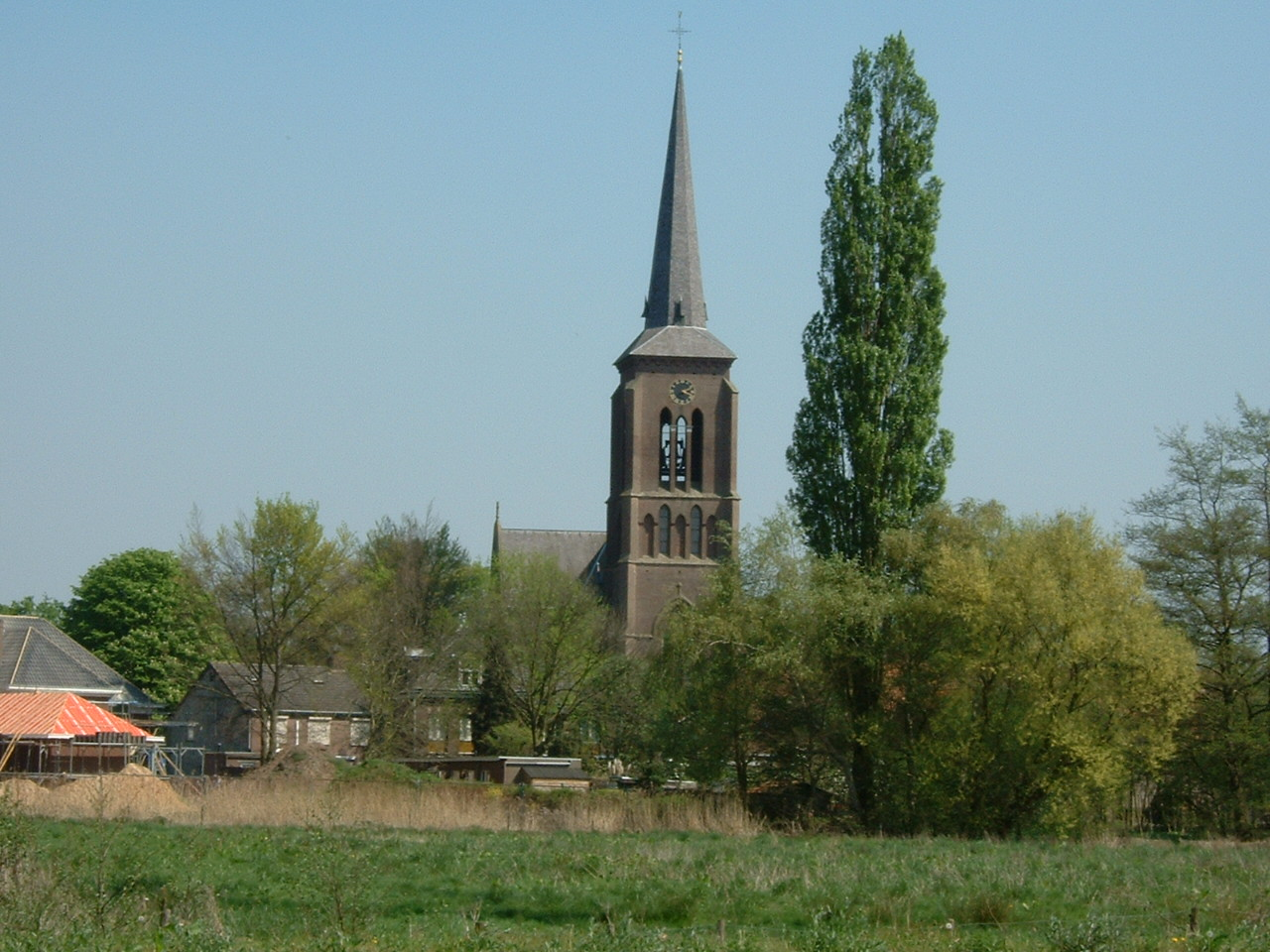 Eigen foto